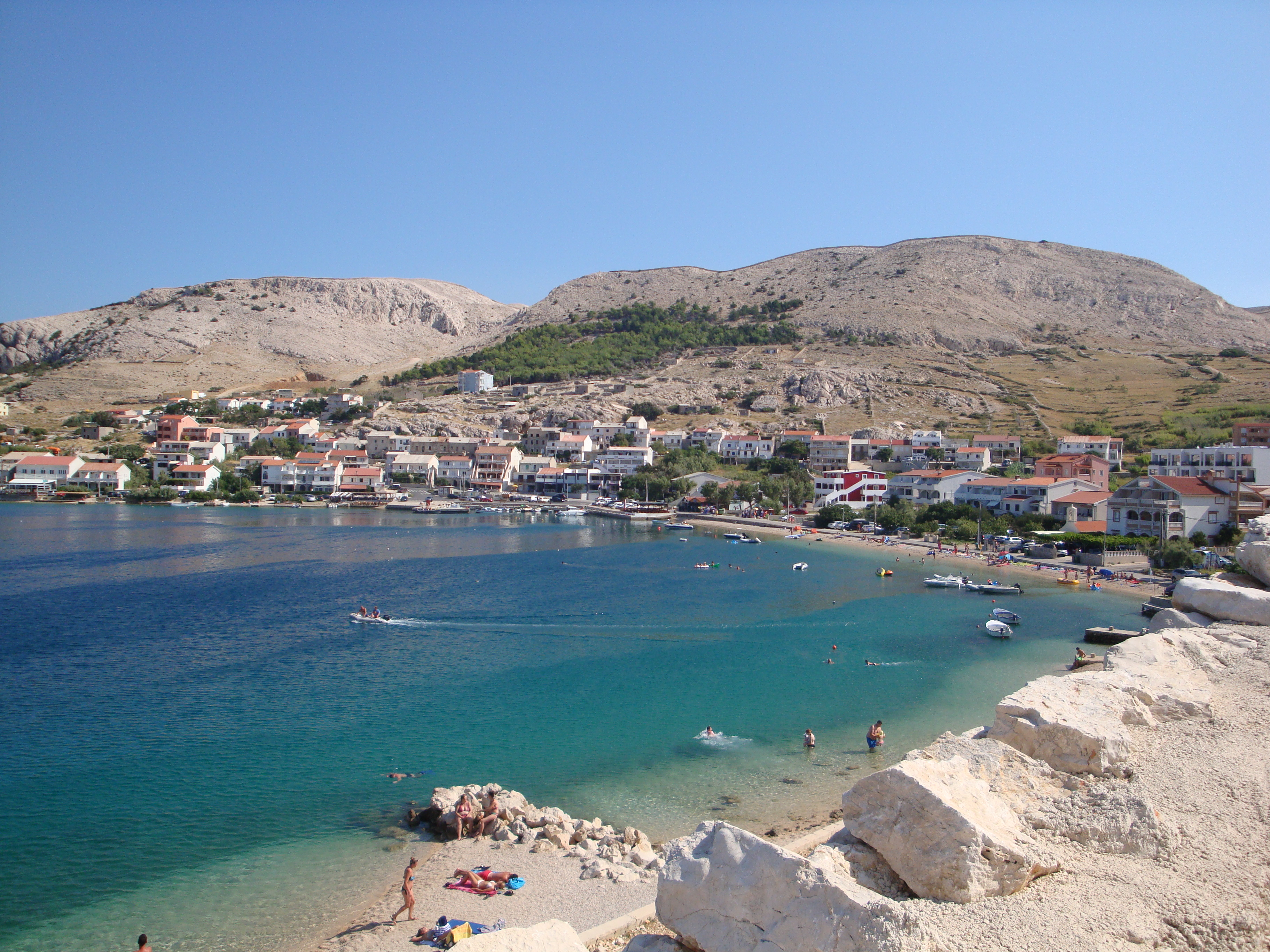 Metajna na otoku Pagu